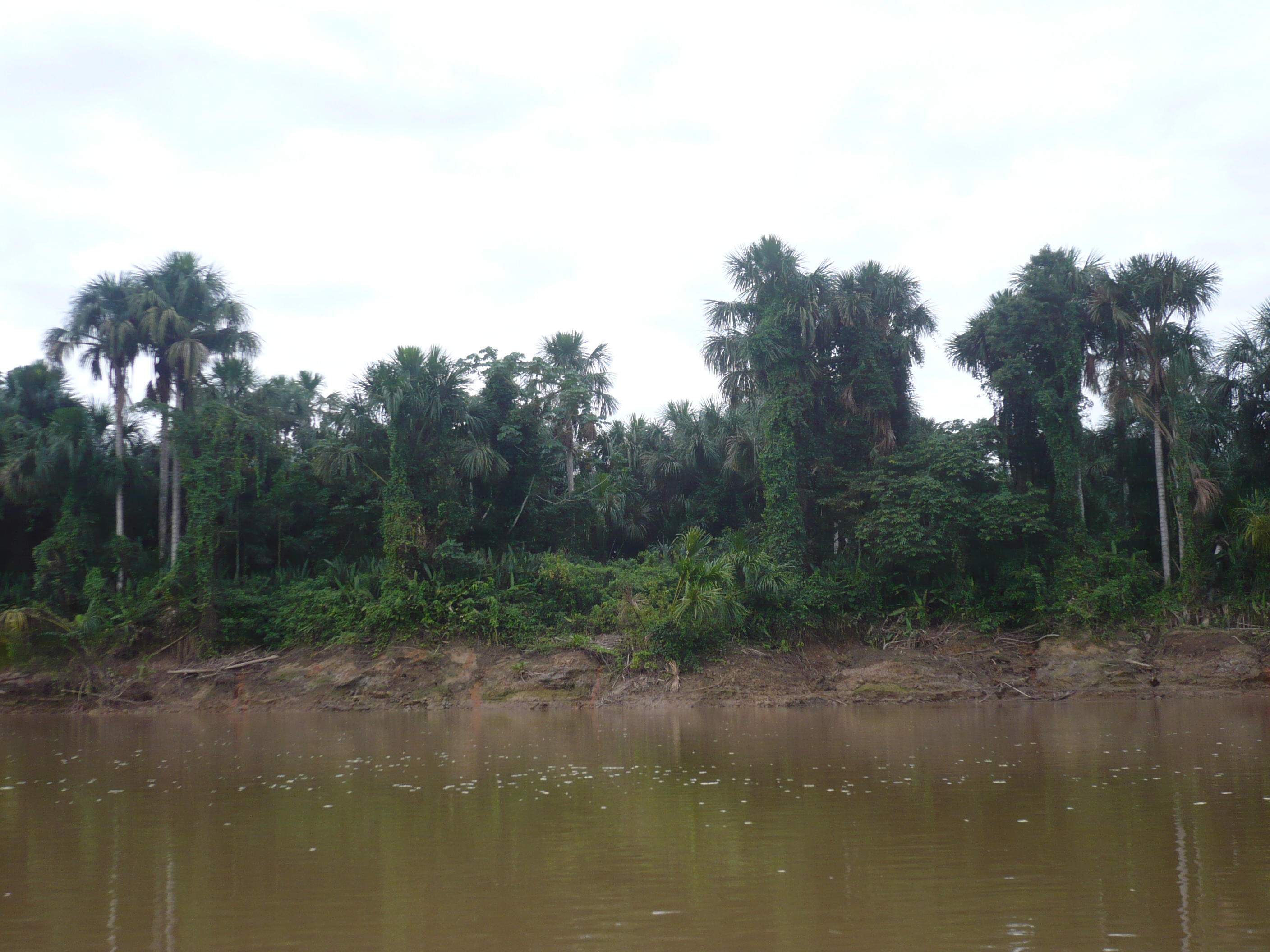 Río Manu en el Parque Nacional del Manu.